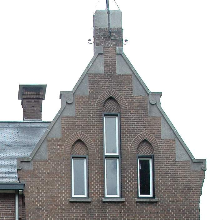 Park 55, Nueuen, NL